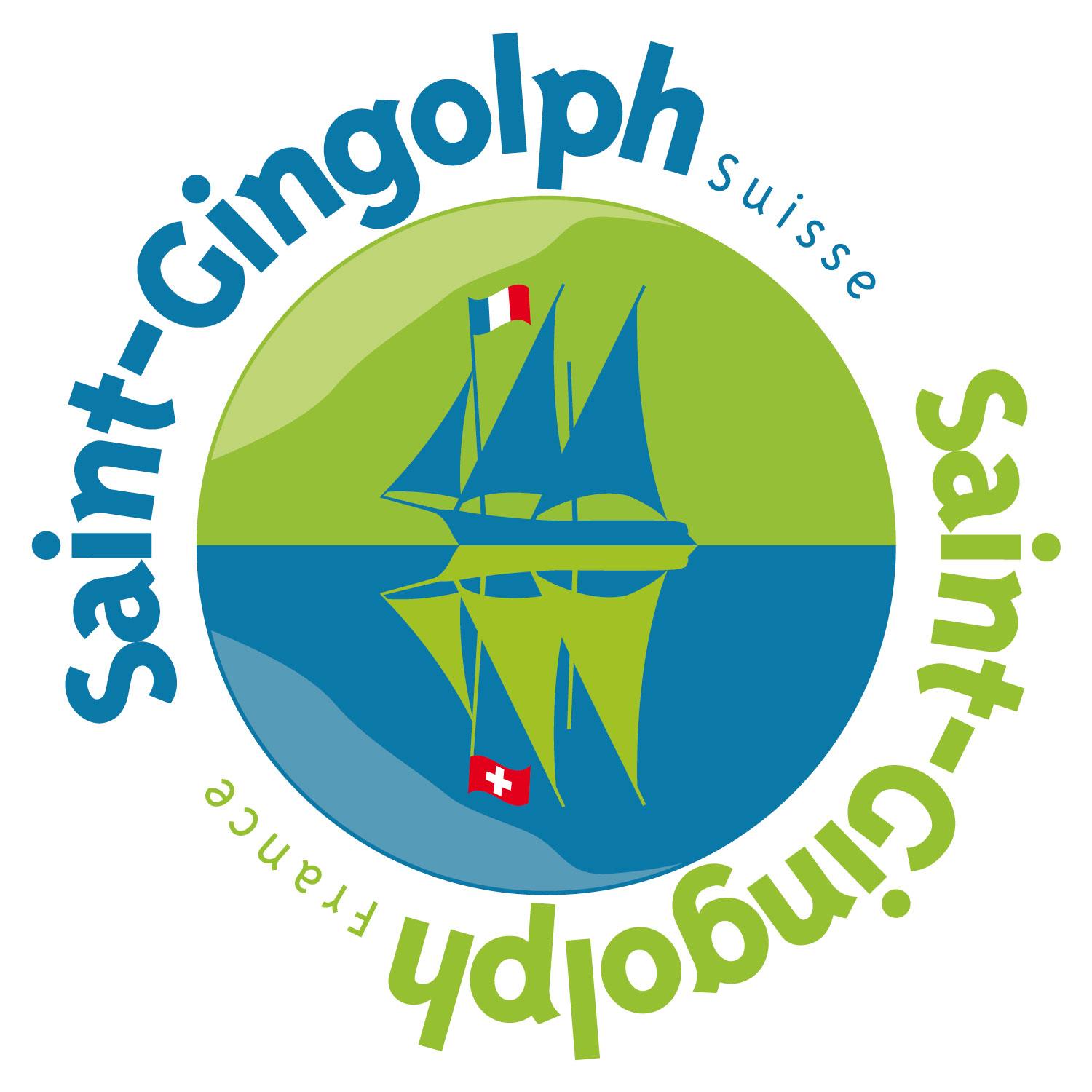 Logo officiel touristique du village franco-suisse de Saint-Gingolph.